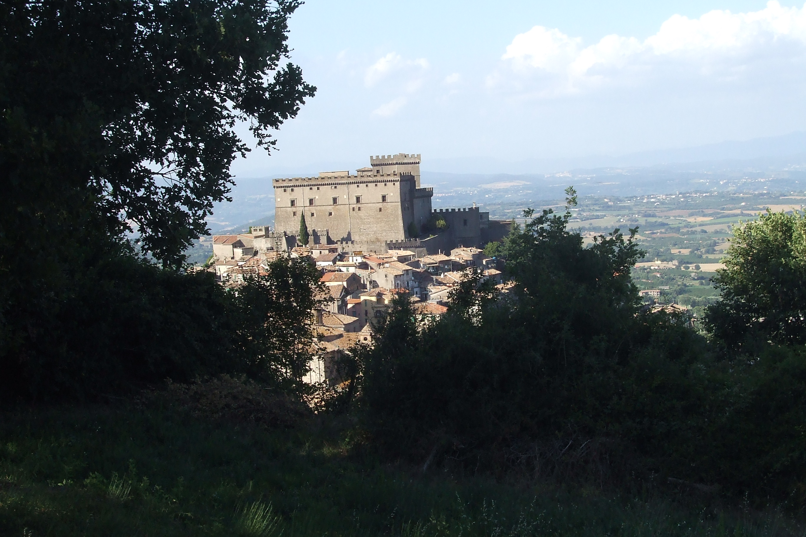 Castello Orsini. Volapük: Kasted di Soriano.